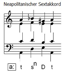 Neapolitanischer Sextakkord